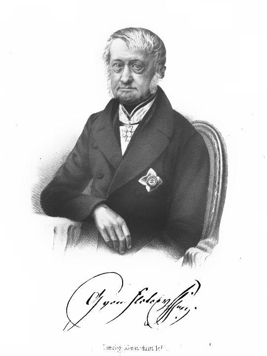 Gustav von Flotow, Porträt mit Signatur